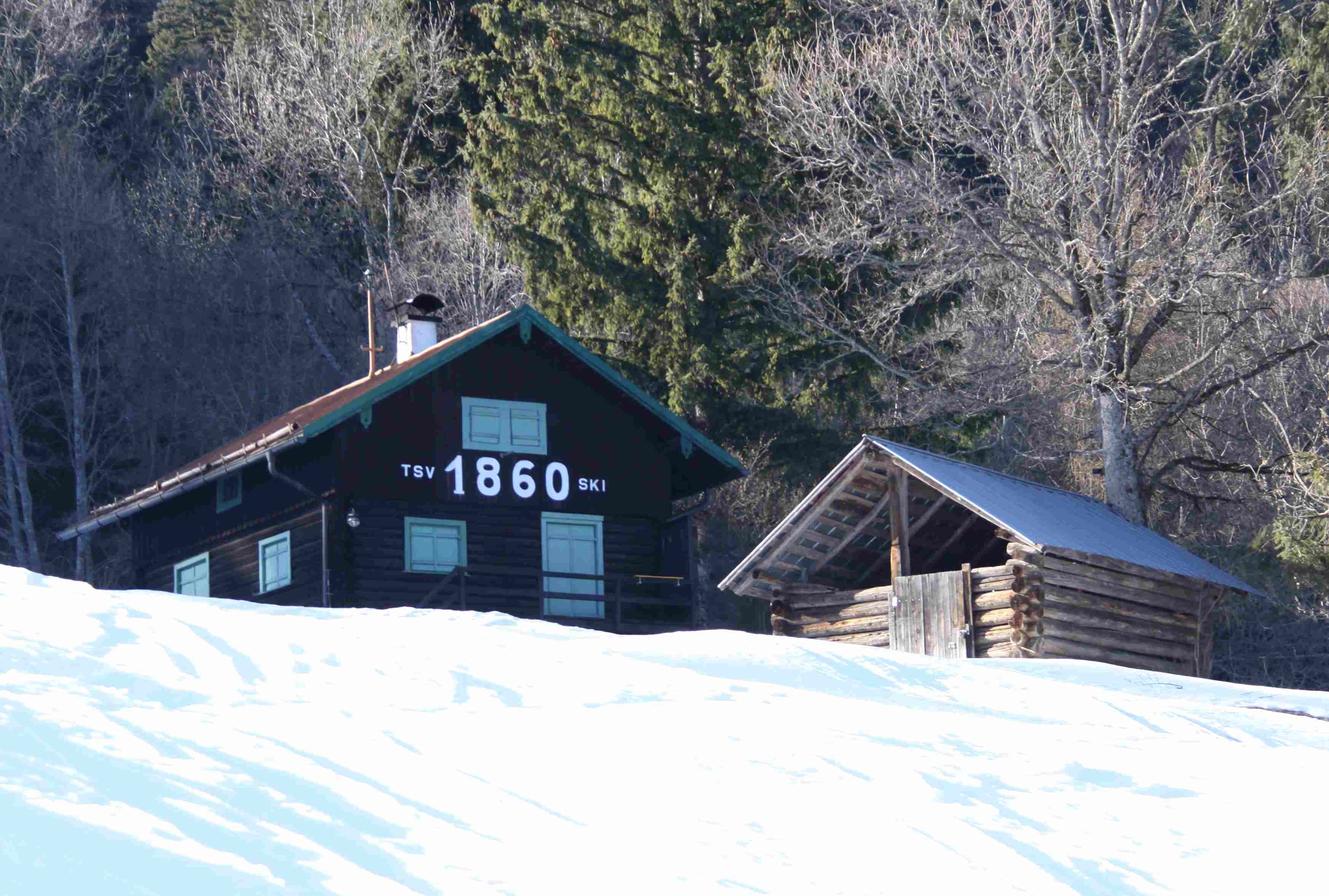 Ski-Hütte TSV 1860 Partenkirchen